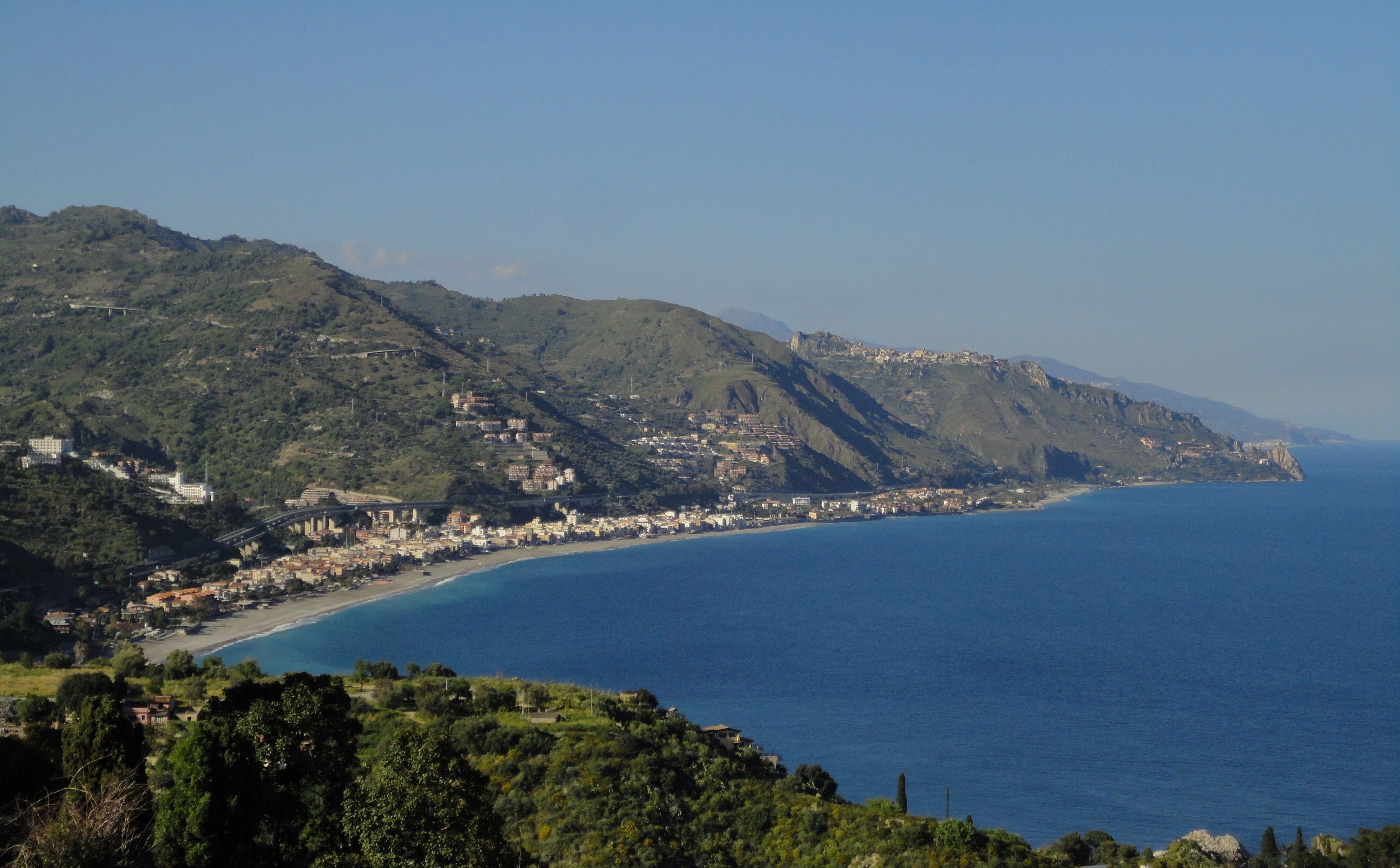 LETOJANNI - Panorama dal belvedere di Taormina